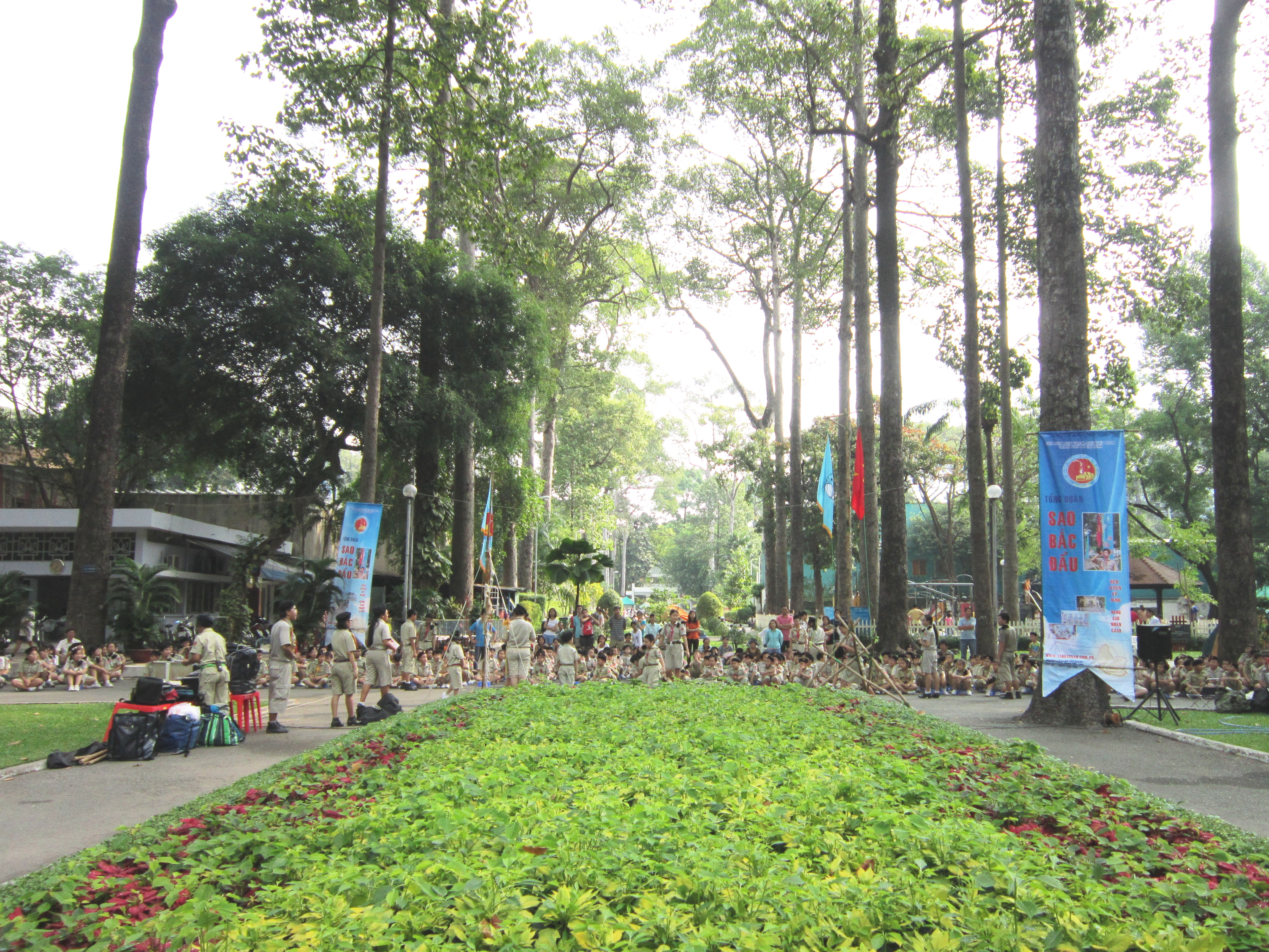 Các thanh thiếu nhi đang sinh hoạt trong Công viên Văn hóa Tao Đàn ở quận 1, Thành phố Hồ Chí Minh, Việt Nam.